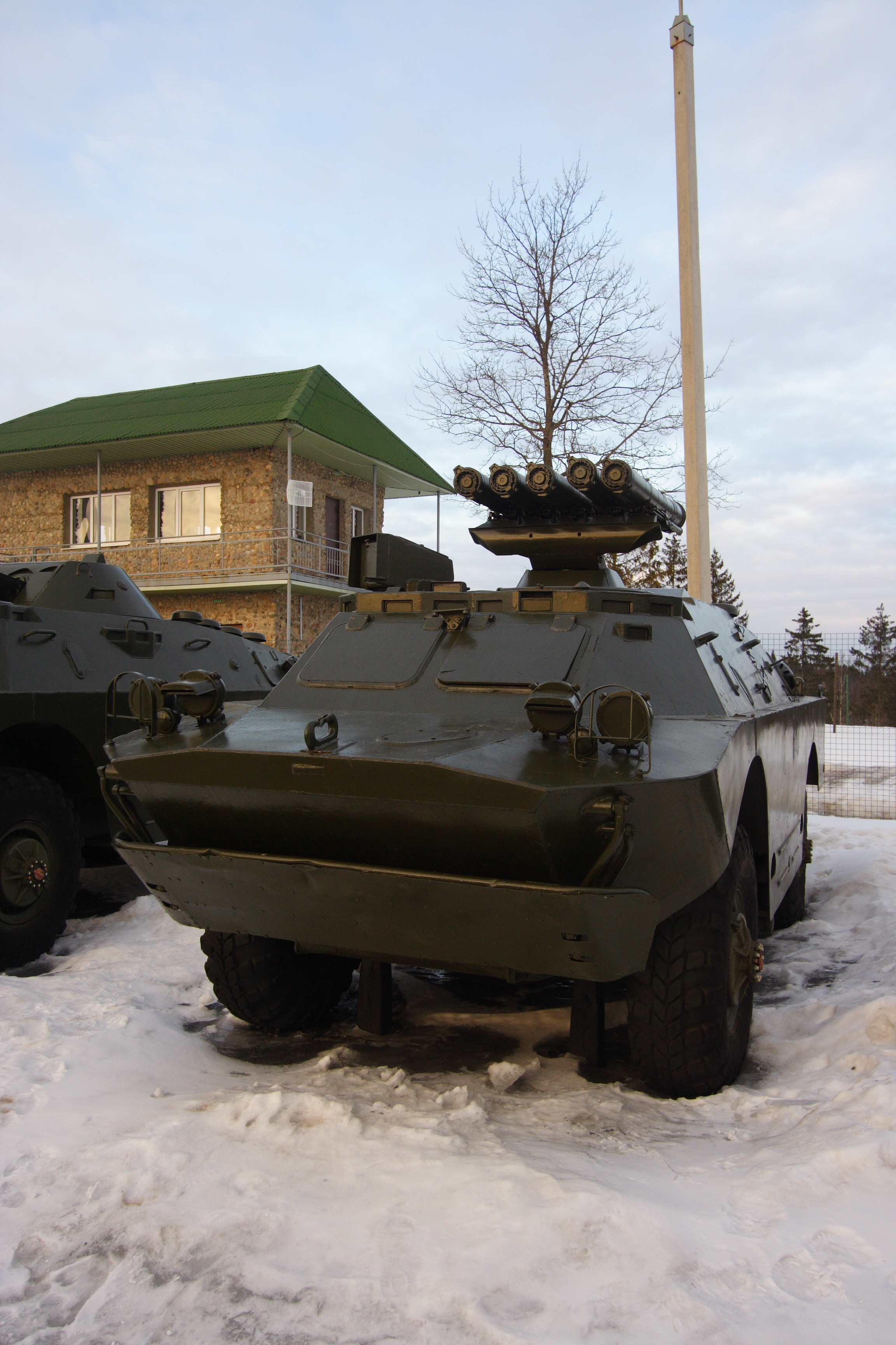 9P148 Konkurs